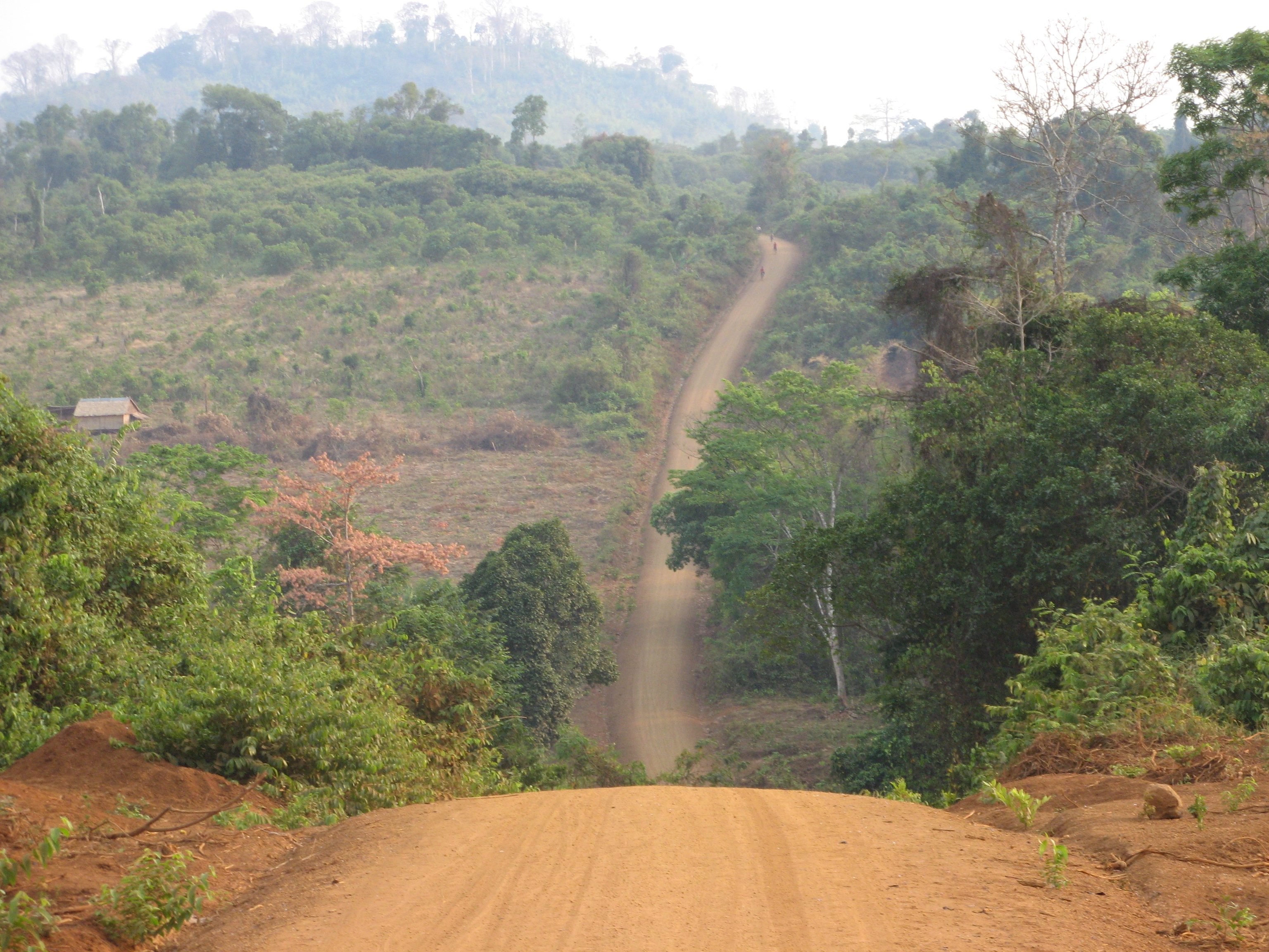 Road in Ratanakiri, Cambodia